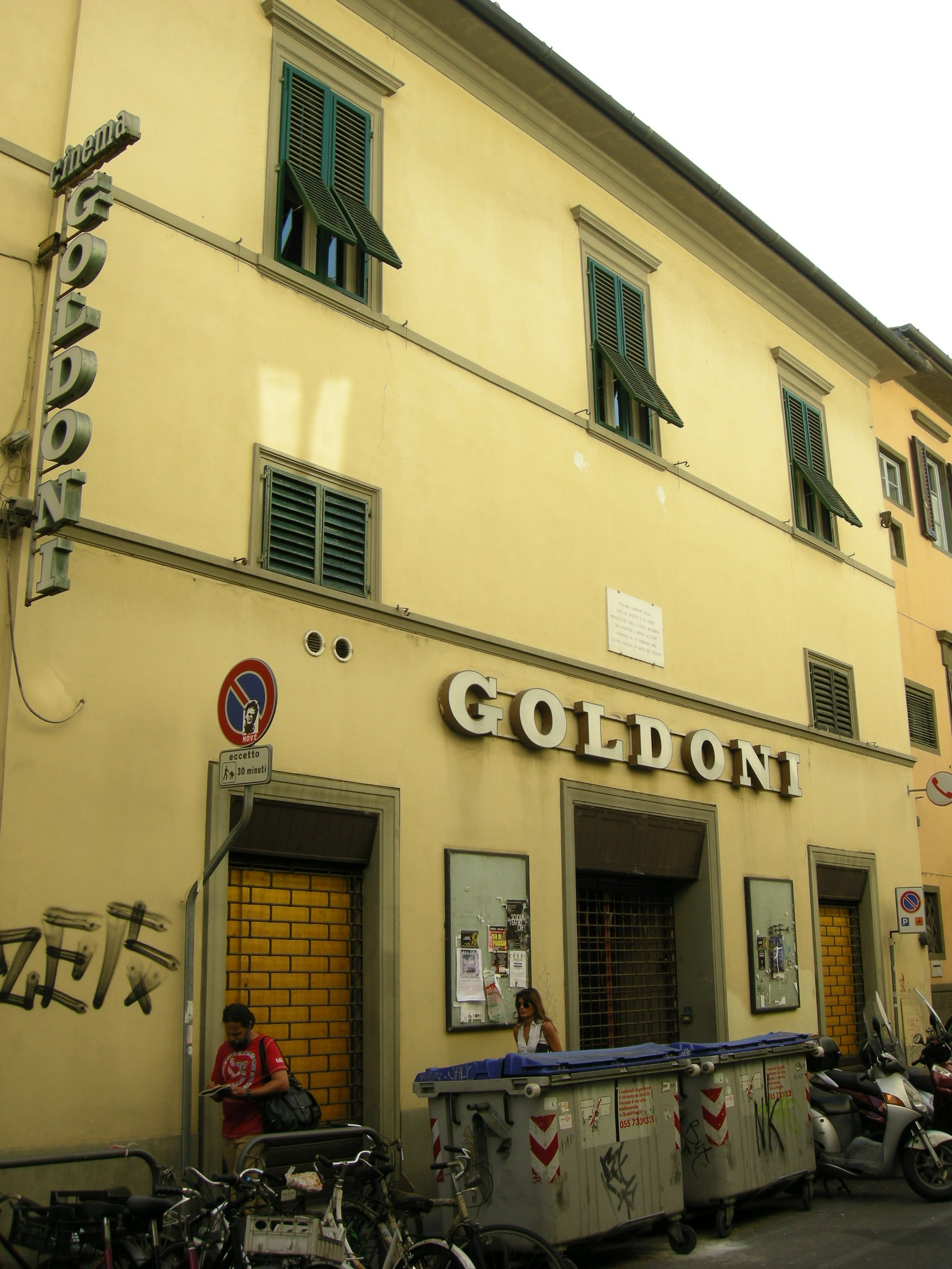 Ciname goldoni